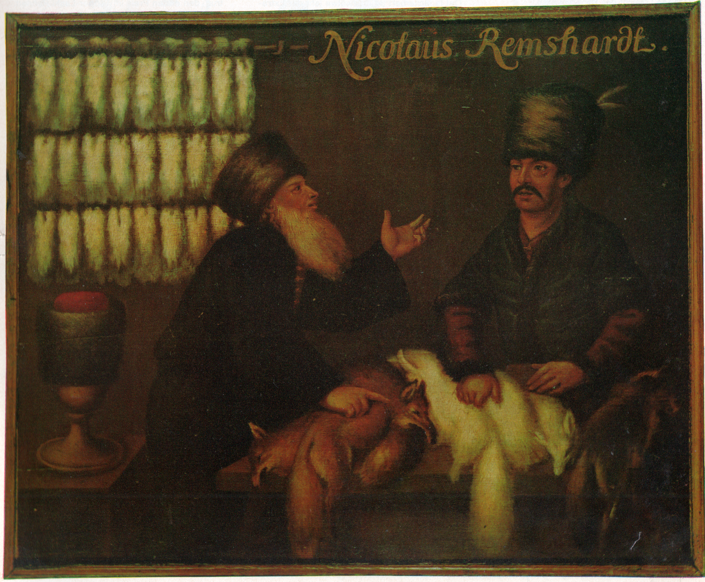 Firmenschild des Kürschners Nicolaus Remshardt aus Göppingen. Das Schild wurde von dem Kürschner mit dem Pferdewagen zu den Leipziger Messen mitgenommen und dort am Messestand angebracht. Die Abbildung zeigt einen sibirschen Pelztierjäger in Verhandlung mit einem russischen Rauchwarenhändler. Im Hintergrund ein Fellfutter aus Fehwammen. Ein Stuttgarter Nachkomme des Kürschnergeschlechts Remshardt bewahrt jetzt noch das historische, tradutionsreiche Firmenschild des Nicolaus Remshardt auf, das aus dem ersten Drittel des 19. Jahrhunderts stammt. Das Kürschnergeschlecht Remshardt erscheint schon 1760 in den Göppinger Steuerbüchern. 1829 wird dort Nicolaus Remshardt als Rauchwarenhändler genannt. Nach einem Bericht von 1839 über das württ. Kürschnergewerbe soll sein Geschäft „zu einem der bedeutendsten in Deutschland gehören“. 1867 verlegte ein Nachkomme das elterliche Geschäft nach Stuttgart in die Eberhardtstraße 27. Der letzte Geschäftsinhaber, Karl Remshardt, 1839-1920, wurde über die Kreise seines Berufs hinaus als humorvoller Mundartdichter bekannt.